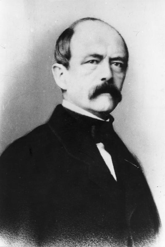 Zentralbild Otto Fürst von Bismarck-Schönhausen preußisch-deutscher Staatsmann, geb. 1.4.1815 Schönhausen, gest. 30.7.1898 Friedrichsruh. seit 1862 preußischer Ministerpräsident und Außenminister und vom 18.1.1871 bis 1890 Reichskanzler des von ihm gegründeten Deutschen Kaiserreichs. (1862) 14995-31